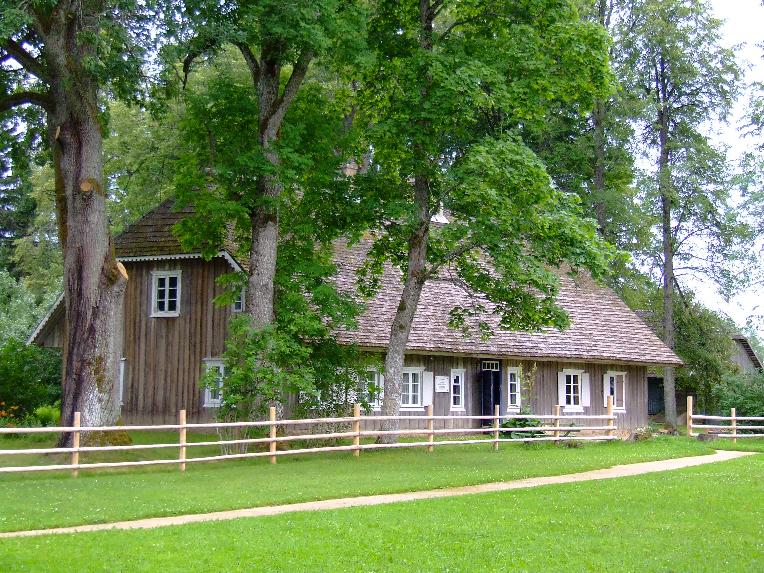 Rakstnieku R. un M.Kaudzīšu dzīves un darba vieta, Vecpiebalgas pagasts